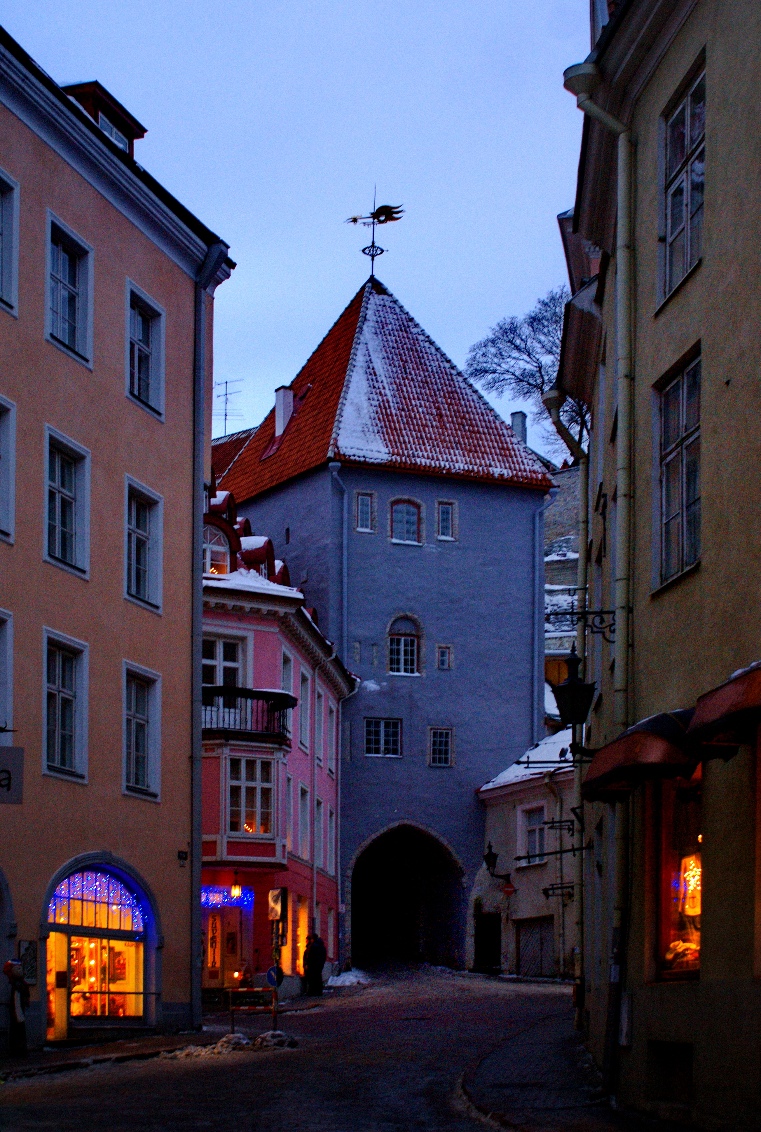 Pika jala väravatorn